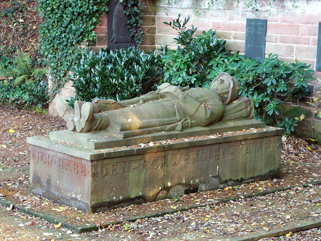 War Memorial - Krieger-/Kriegsopferdenkmal - Mémorial de guerre